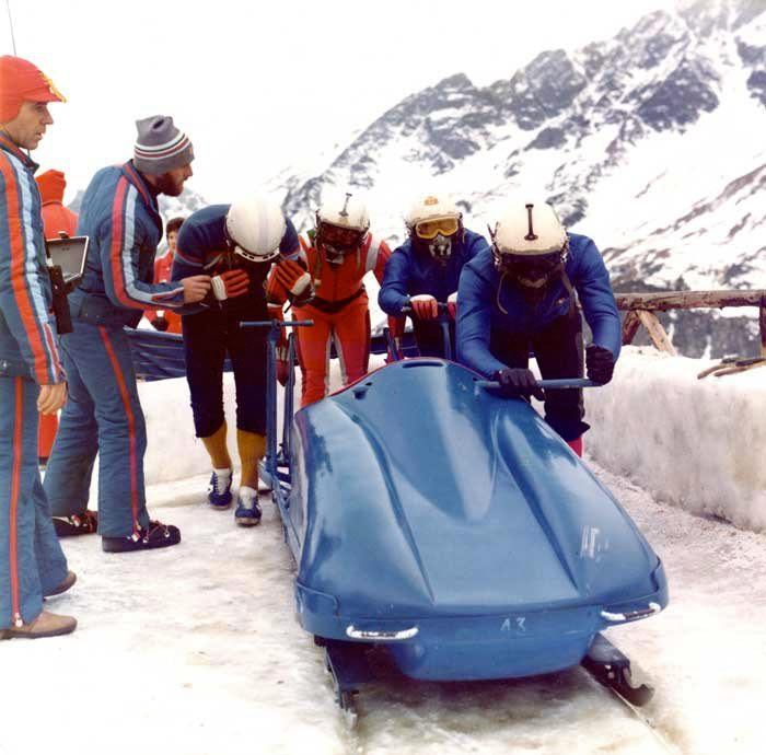 Miani-1976-CERVINIA-1